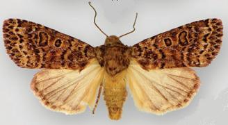 Hypotrix alamosa female